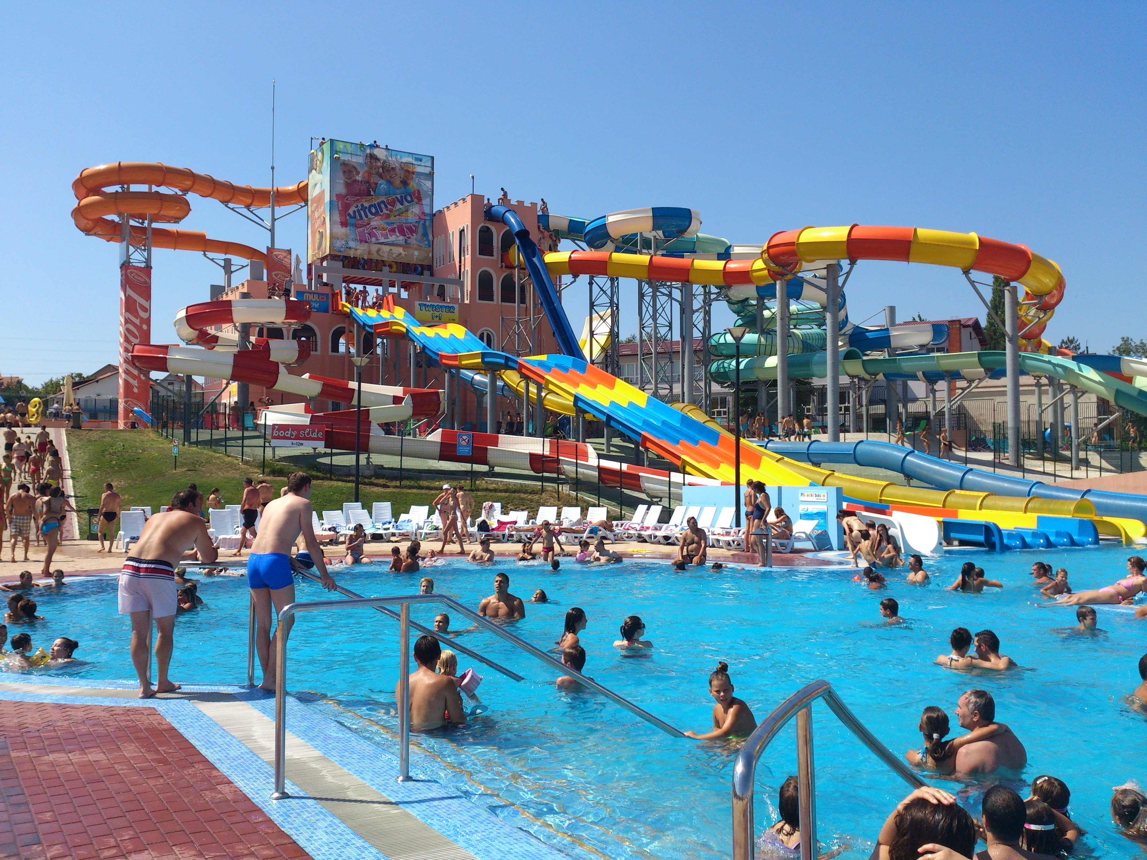 Akva park hotela Izvor u Aranđelovcu.